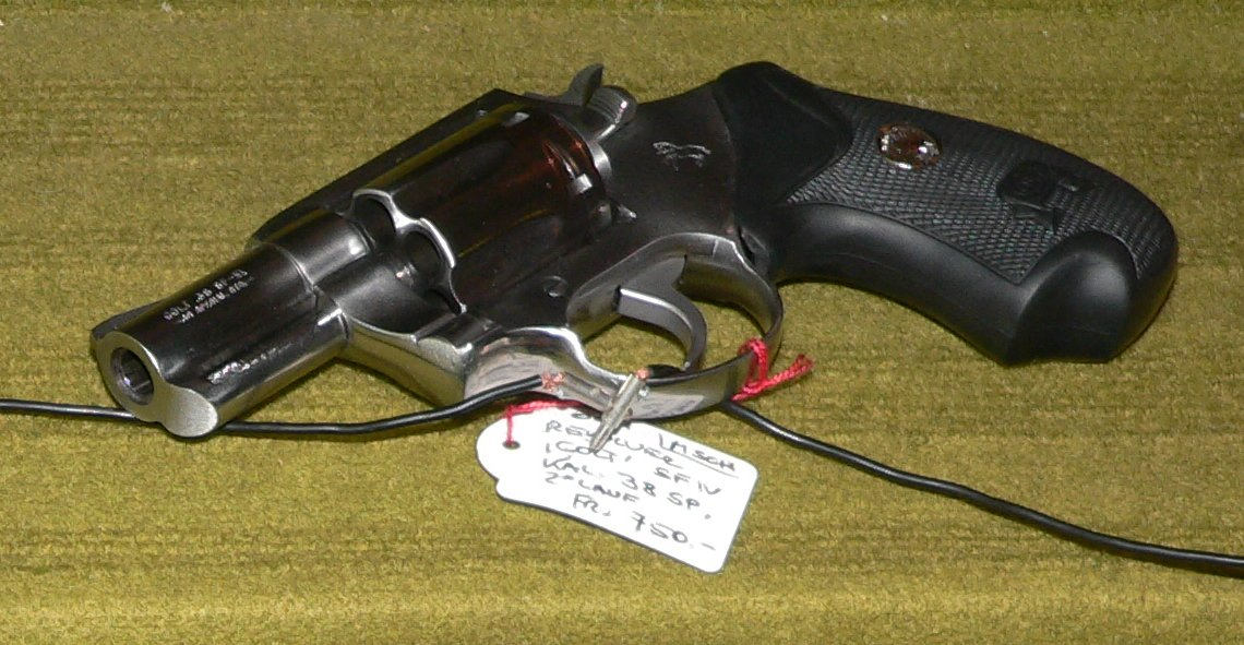 Revolver Colt SF IV, calibre 38 spécial